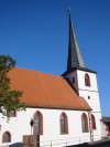 Alte Kirche Wernfeld